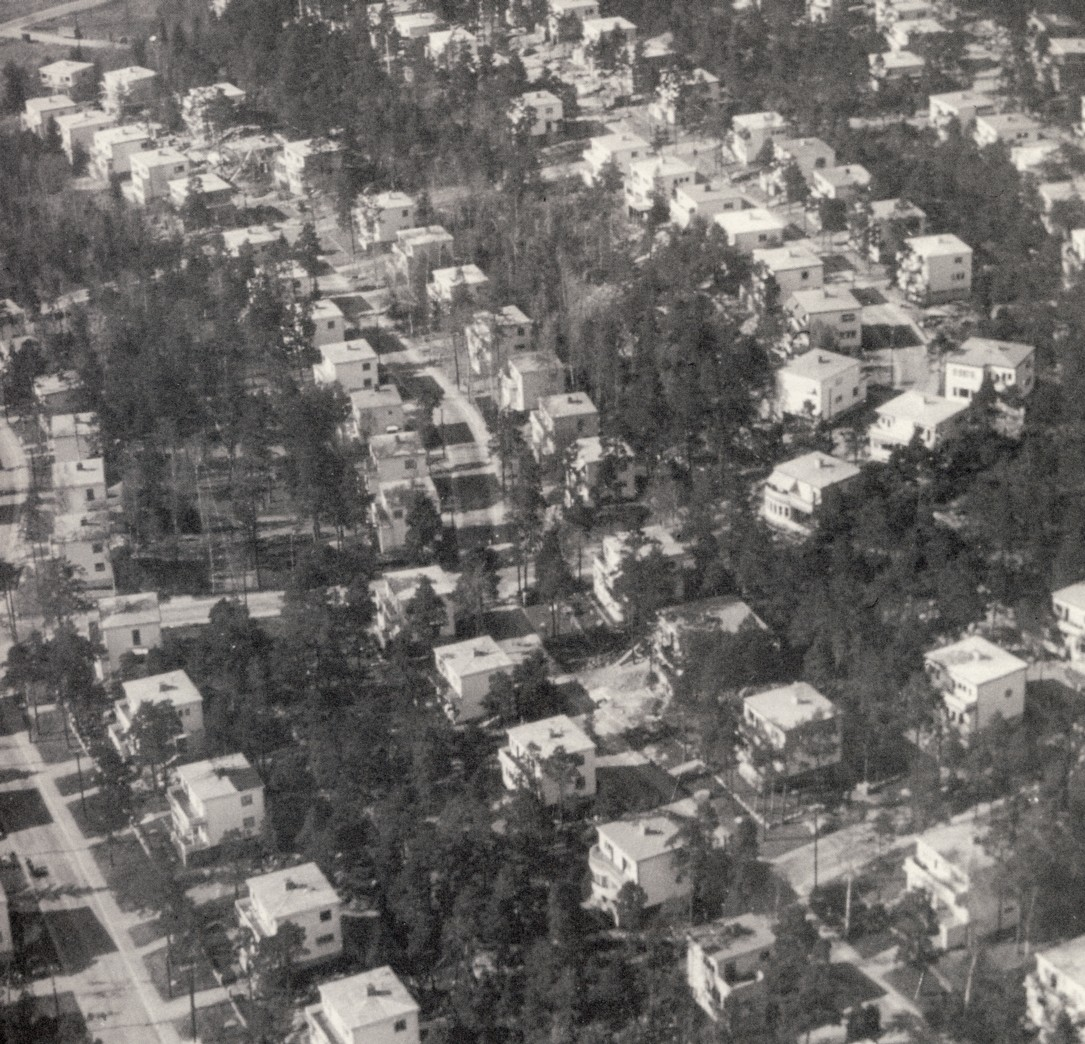 Södra Ängby från luften 1938, Bromma/Stockholm